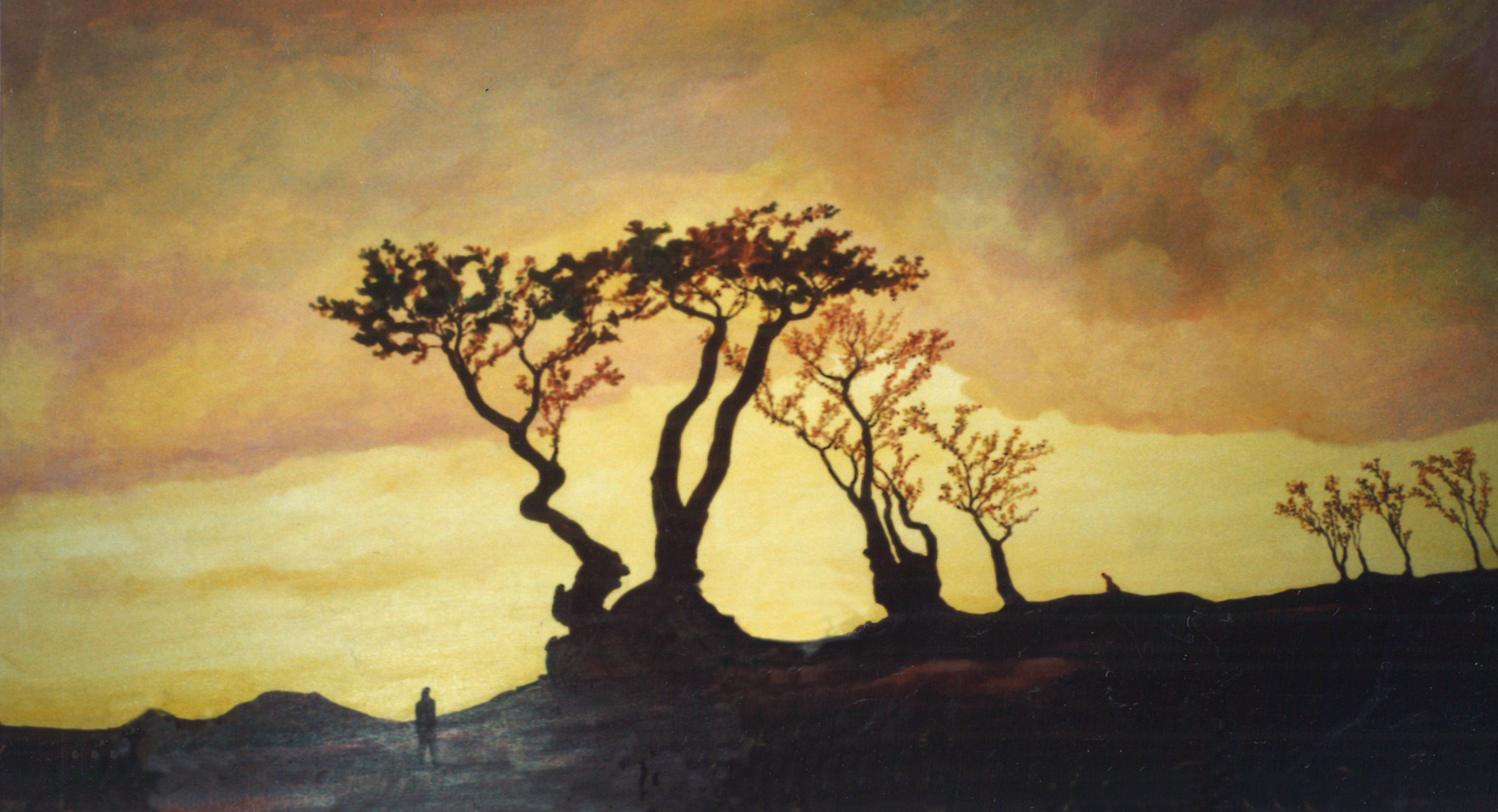 Tableau avec des arbres tordus sur fond d'eau verte, 65 cm x 64 cm